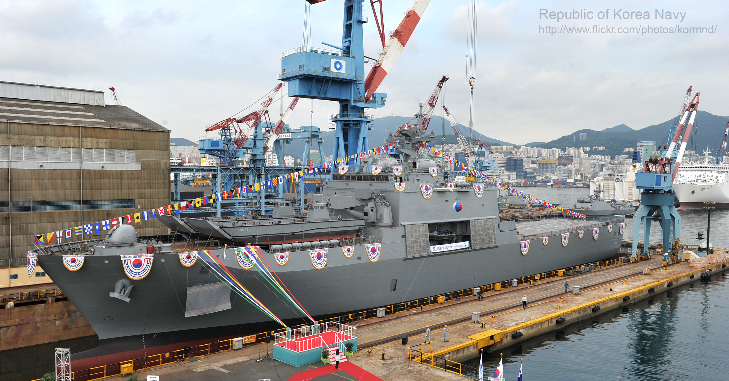 '13. 9.11 차기상륙함인 4500톤급 천왕봉함 진수식이 부산 한진중공업 조선소에서 거행되었다 촬영자 : 배준호